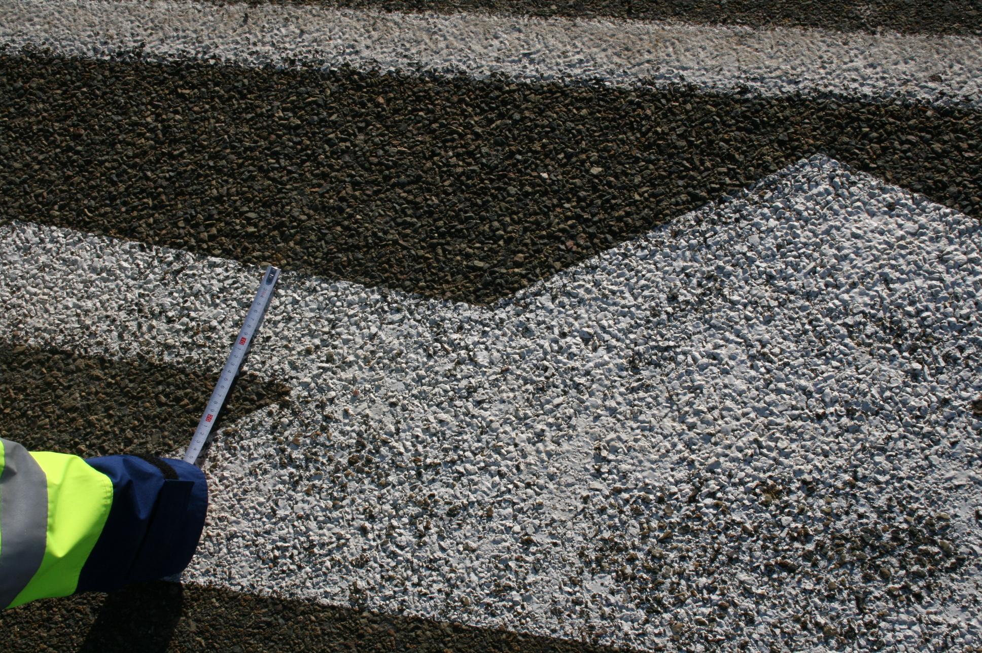 Flèche de rabattement en France - Contrôle des dimensions